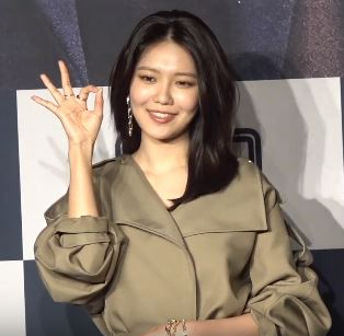 29일 오후 서울시 영등포구 여의도동 콘래드 서울 호텔에서 OCN 새 토일 오리지널 ‘본 대로 말하라’의 제작발표회가 열려 배우 장혁, 최수영, 진서연, 장현성,류승수가 참석해 포토타임을 갖고 있다.